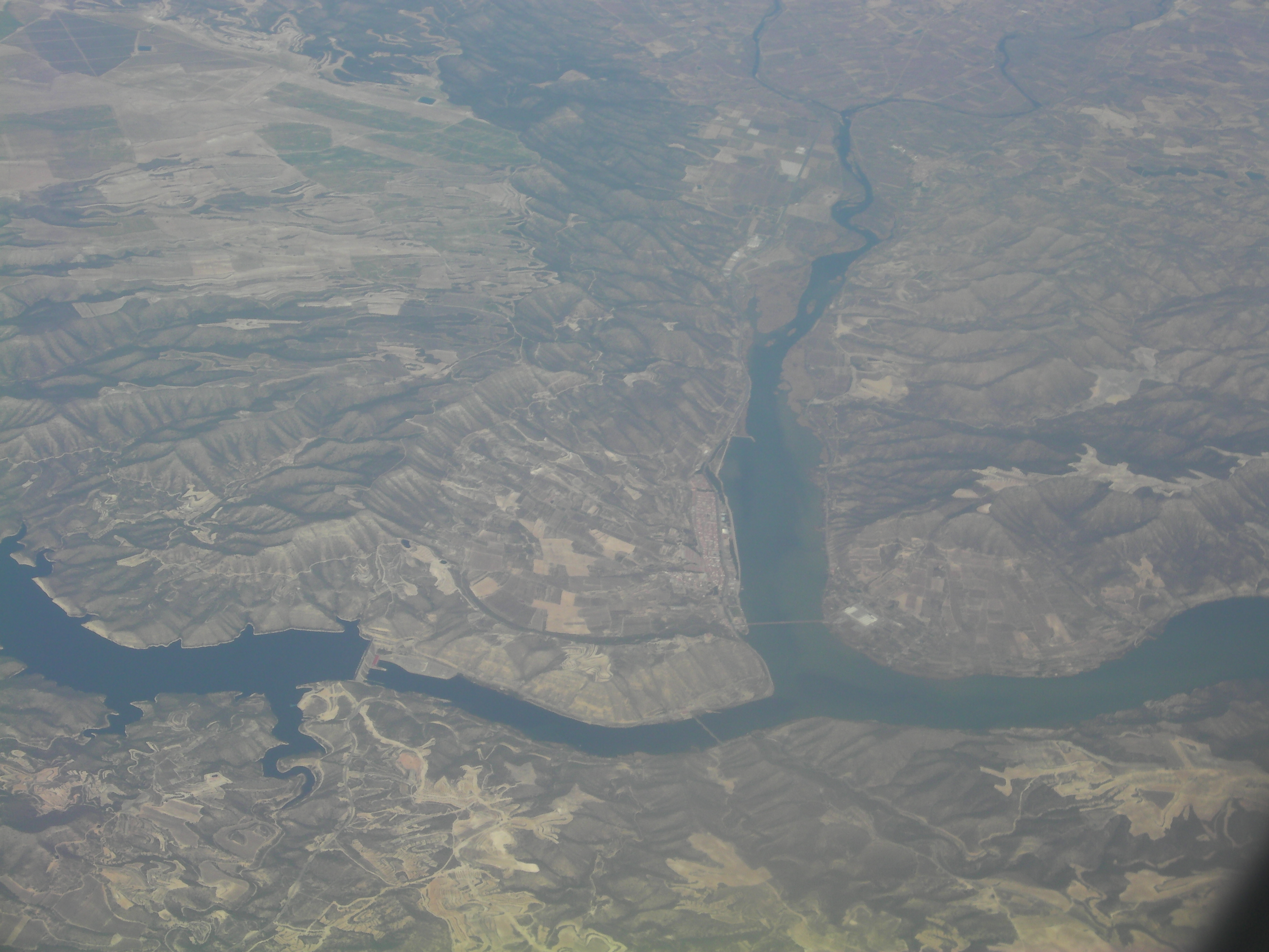 Aiguabarreig Ebre-Segre fotografiat des de l'avió